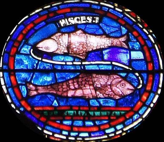 vitrail sud de la Cathédrale de Chartres (détail)